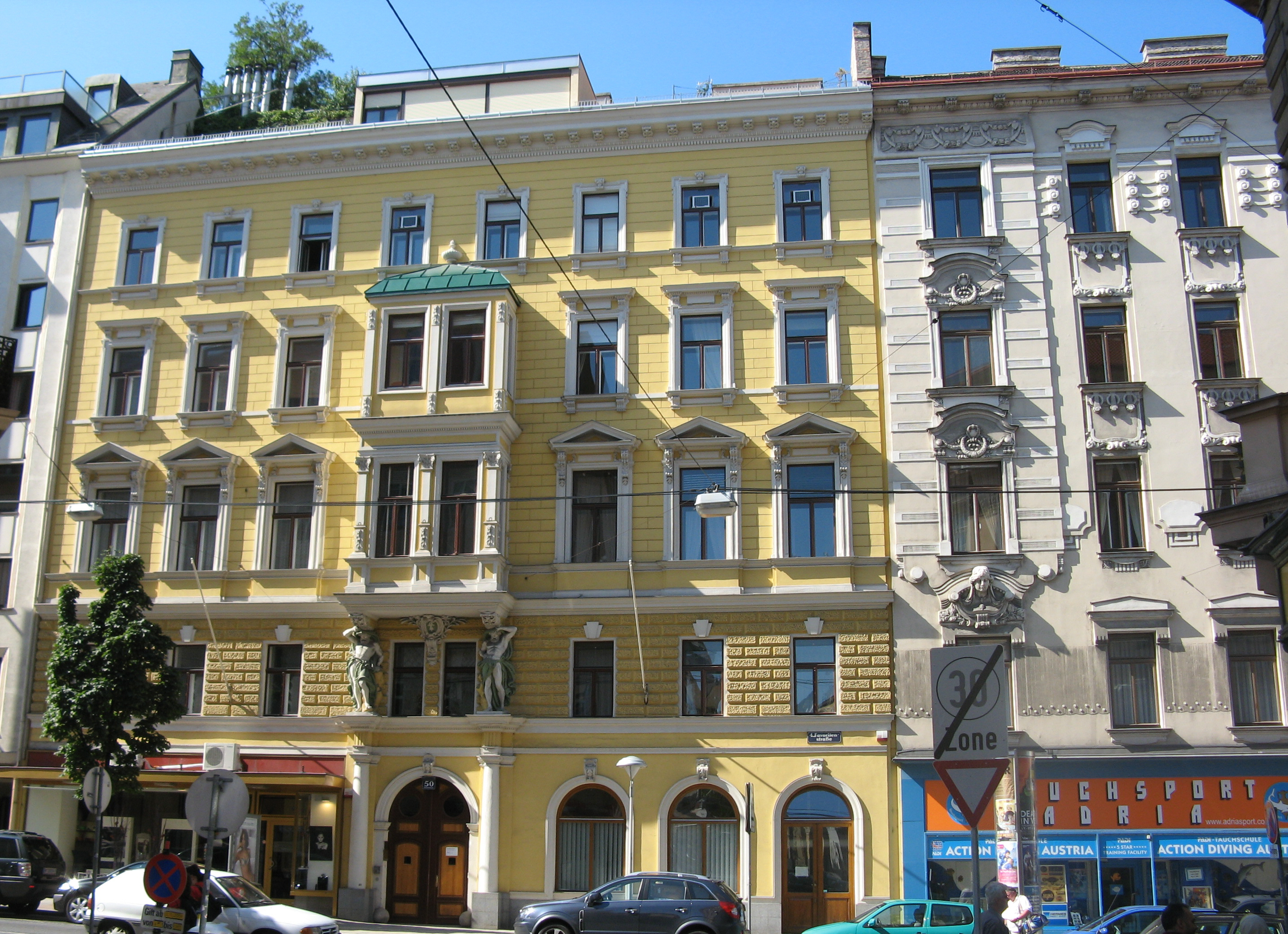 Haus (1882) von Dehm und Olbricht, Favoritenstraße 50, Wien-Wieden